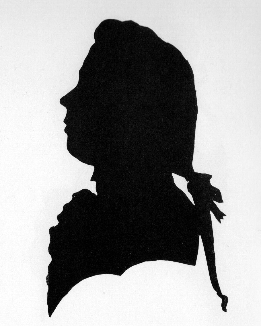 Bernhard Albrecht Moll (1743–1788): Der spätere Direktor der k. k. Hofgärten Franz Boos (1753–1832). Royal Ontario Museum, Toronto.